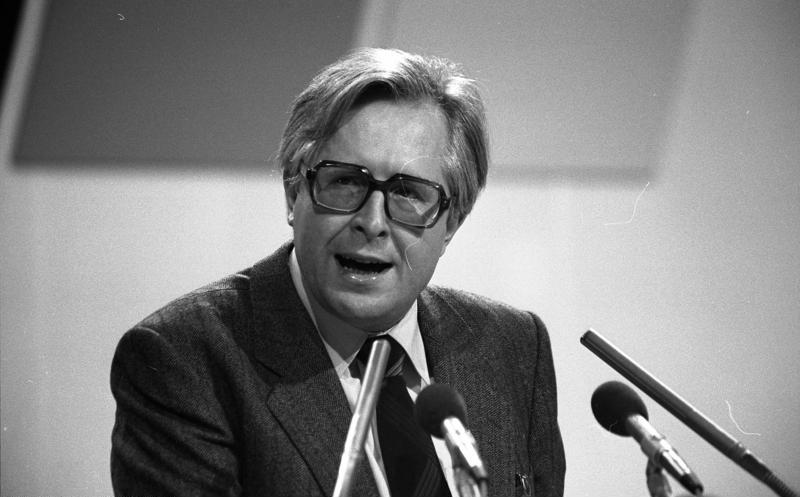 26. Bundesparteitag der CDU in der Friedrich-Ebert-Halle in Ludwigshafen 23.-25.10.1978